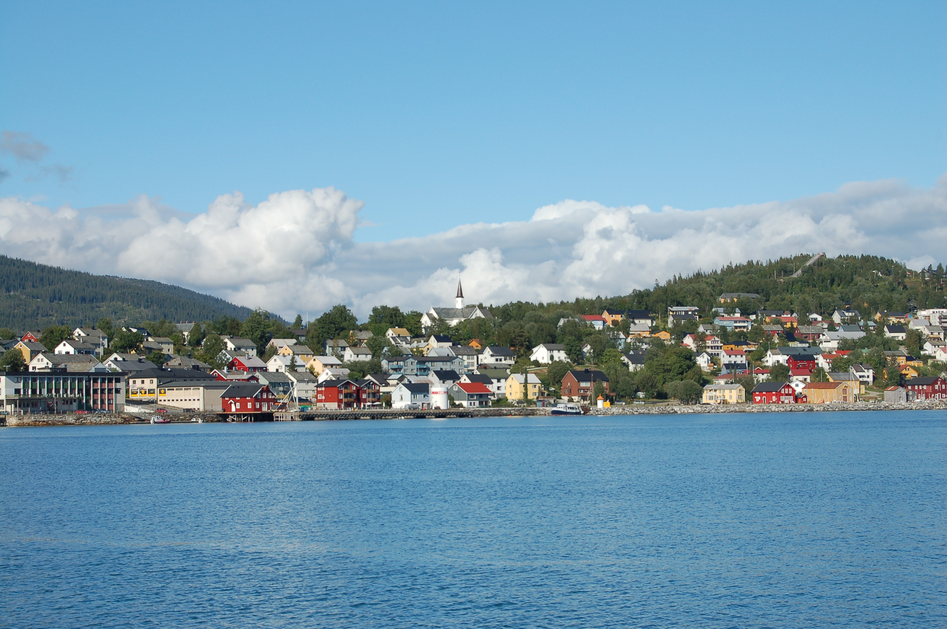 Hemnesberget i Nordland, Norge